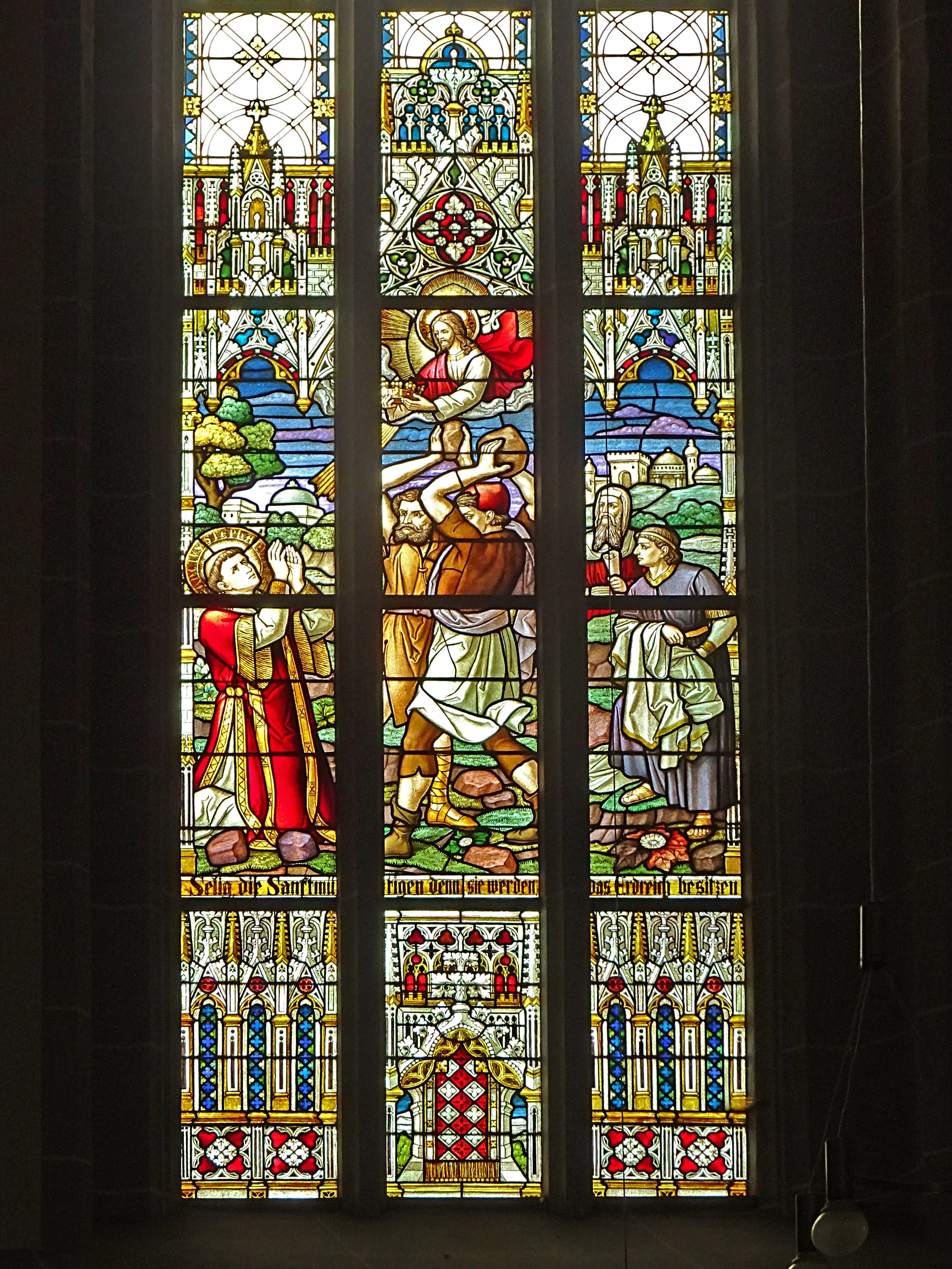 Buntglasfenster in der Pfarrkirche St. Gertrud (Dingelstädt) 2. Selig sind die Sanftmütigen, denn sie werden das Land erben / Die Steinigung des Stephanus